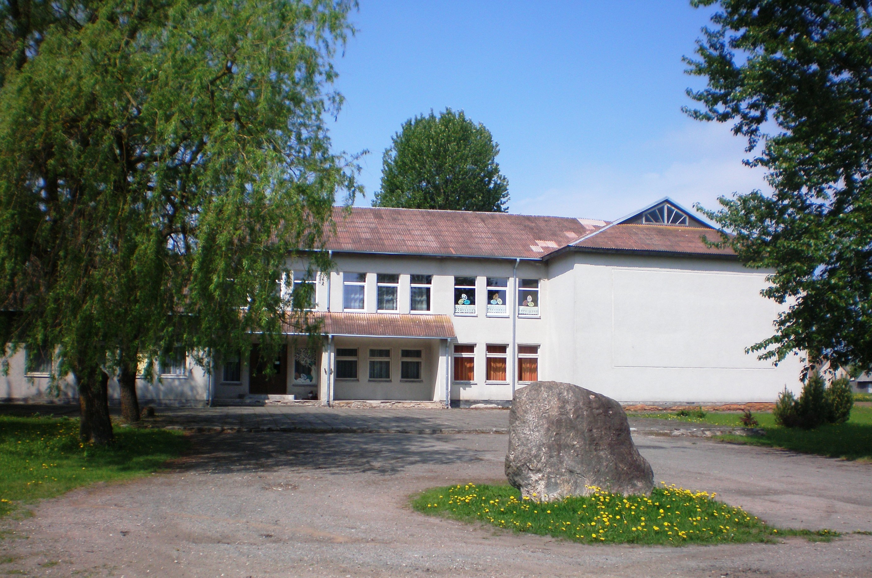 Meironiškiai, kultūros namai, Kėdainių raj.